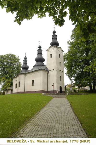 Church Sv.Michal Archanjel-Beloveza (Slovakia)